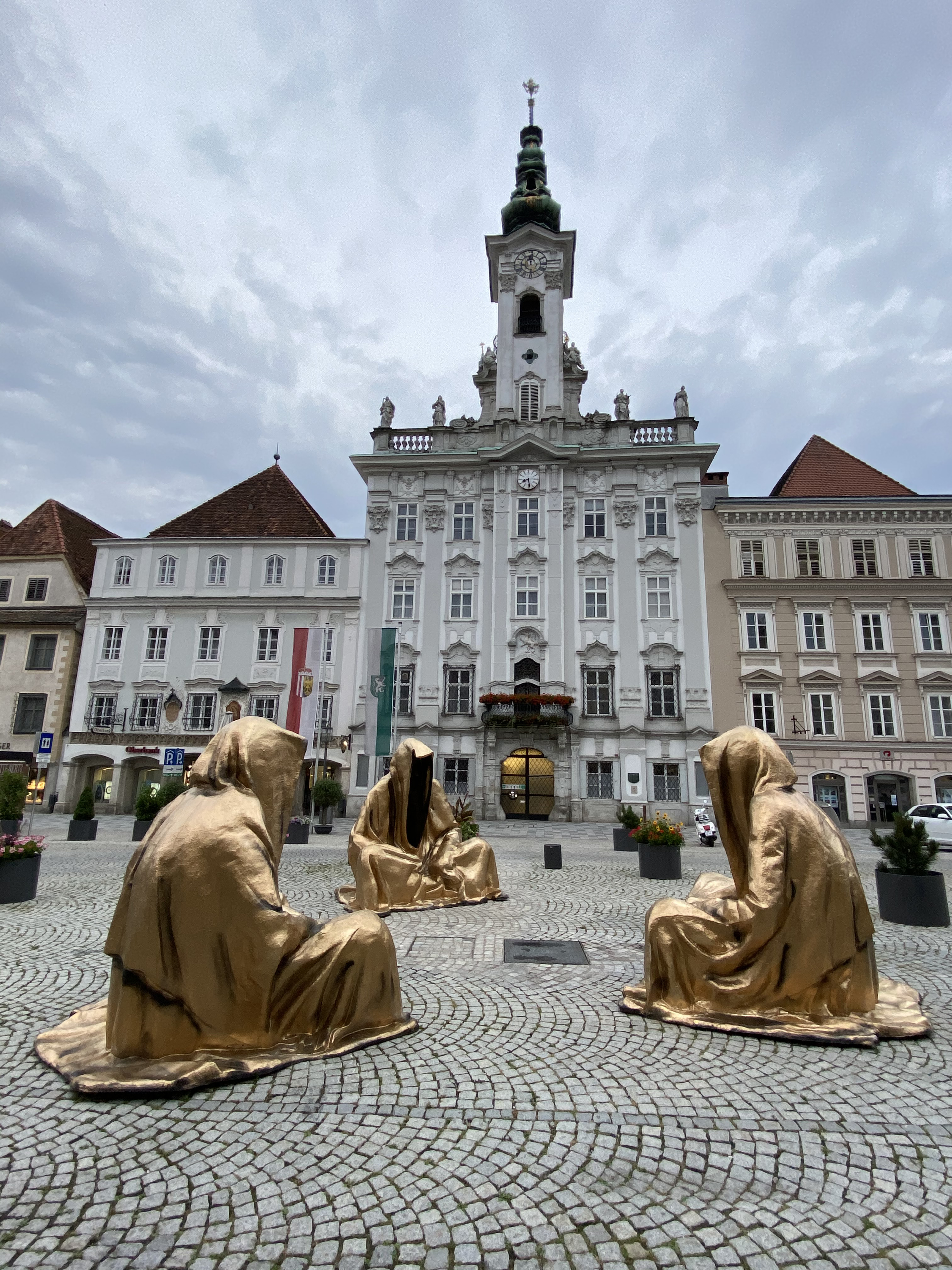 Steyr city sqare mobile galerie guardians of time manfred kielnhofer art event